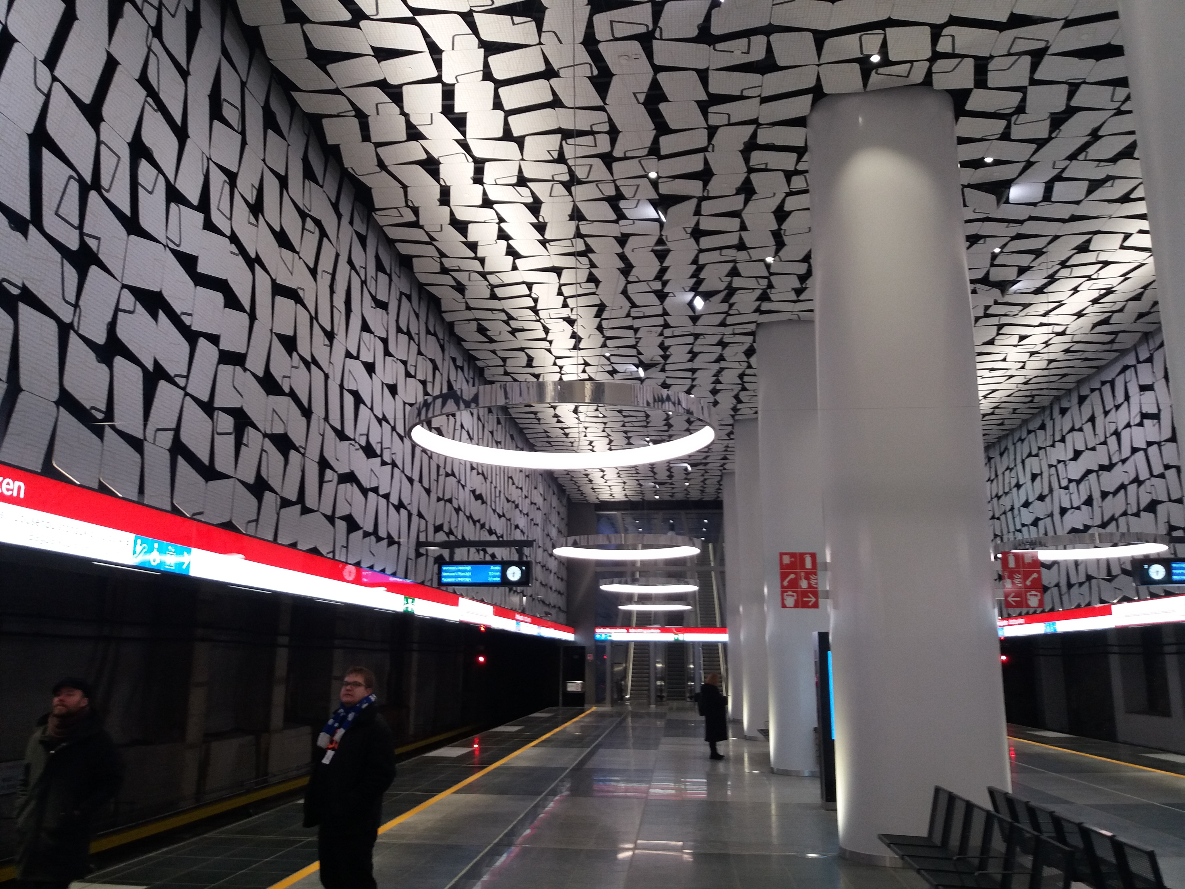 Urheilupuiston metroasema avajaispäivänään.